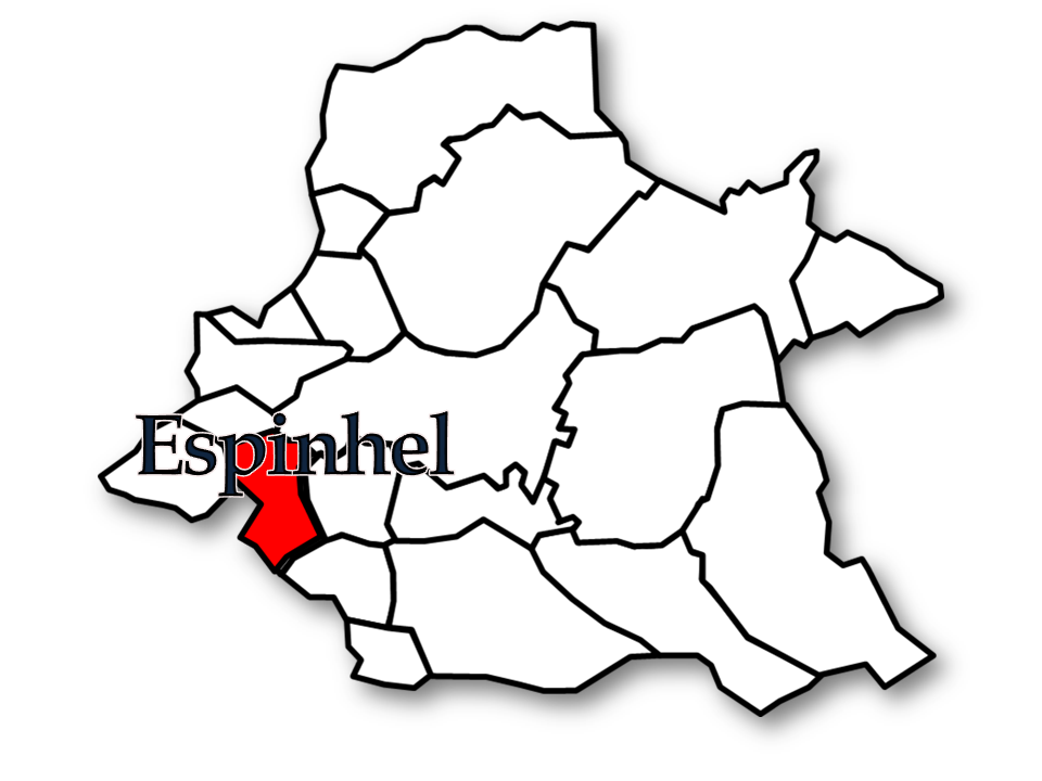 Censos 1864/2011